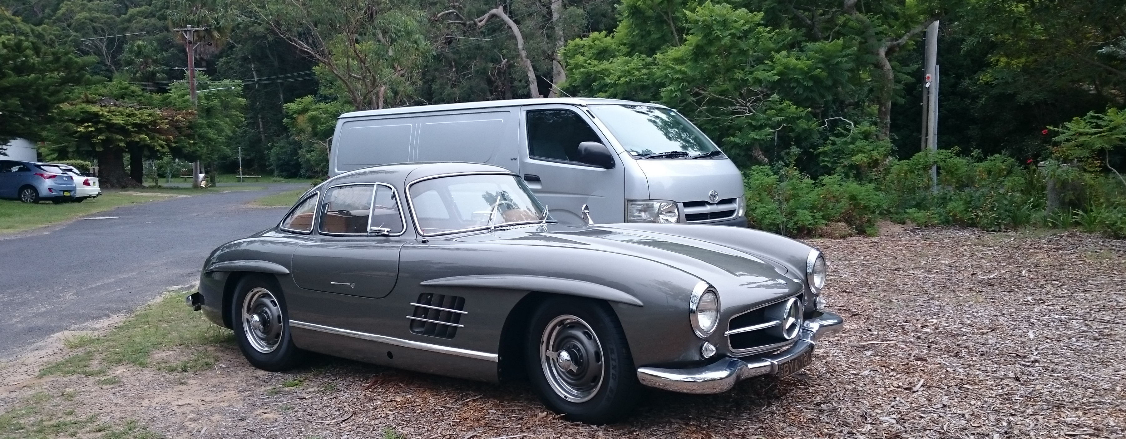 Mercedes-Benz 300SL Gullwing